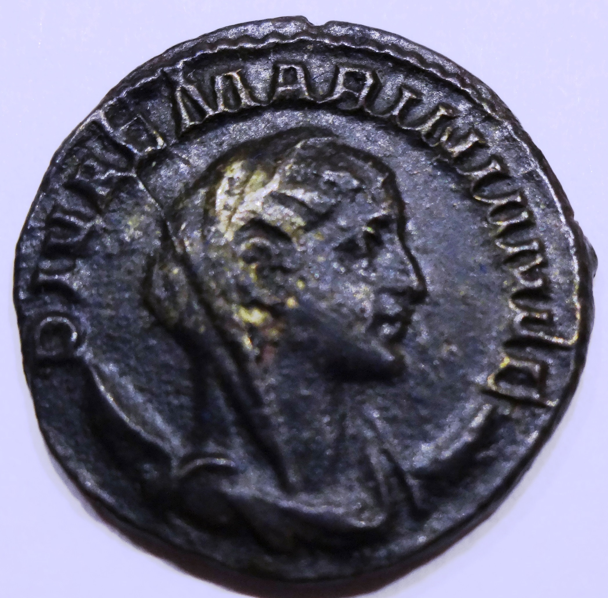 Mariniana auf Münze z.Zt. des Valerianus, Kampmann 89.1.3